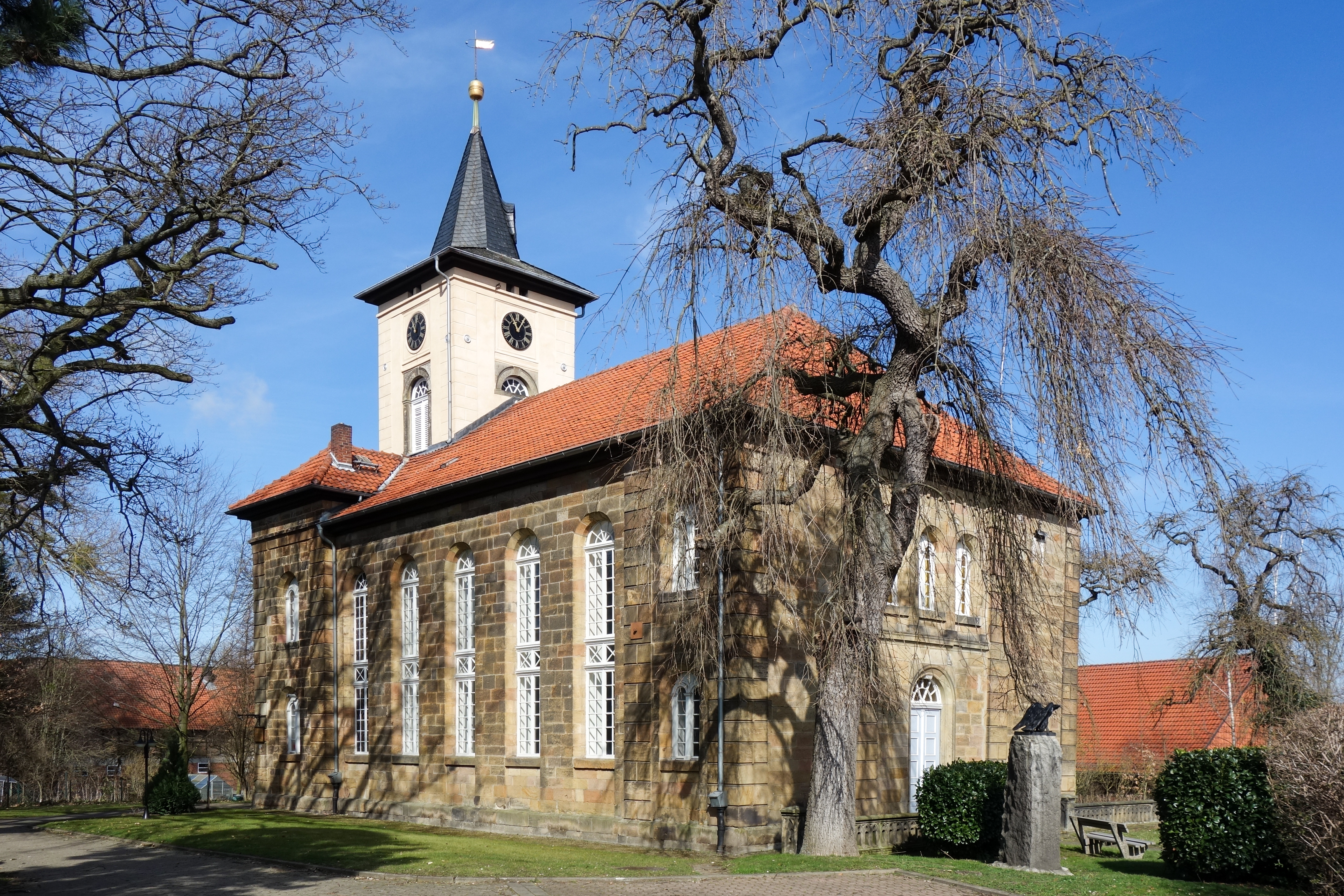 Christuskirche von Salzgitter-Gitter: Ansicht von Südosten